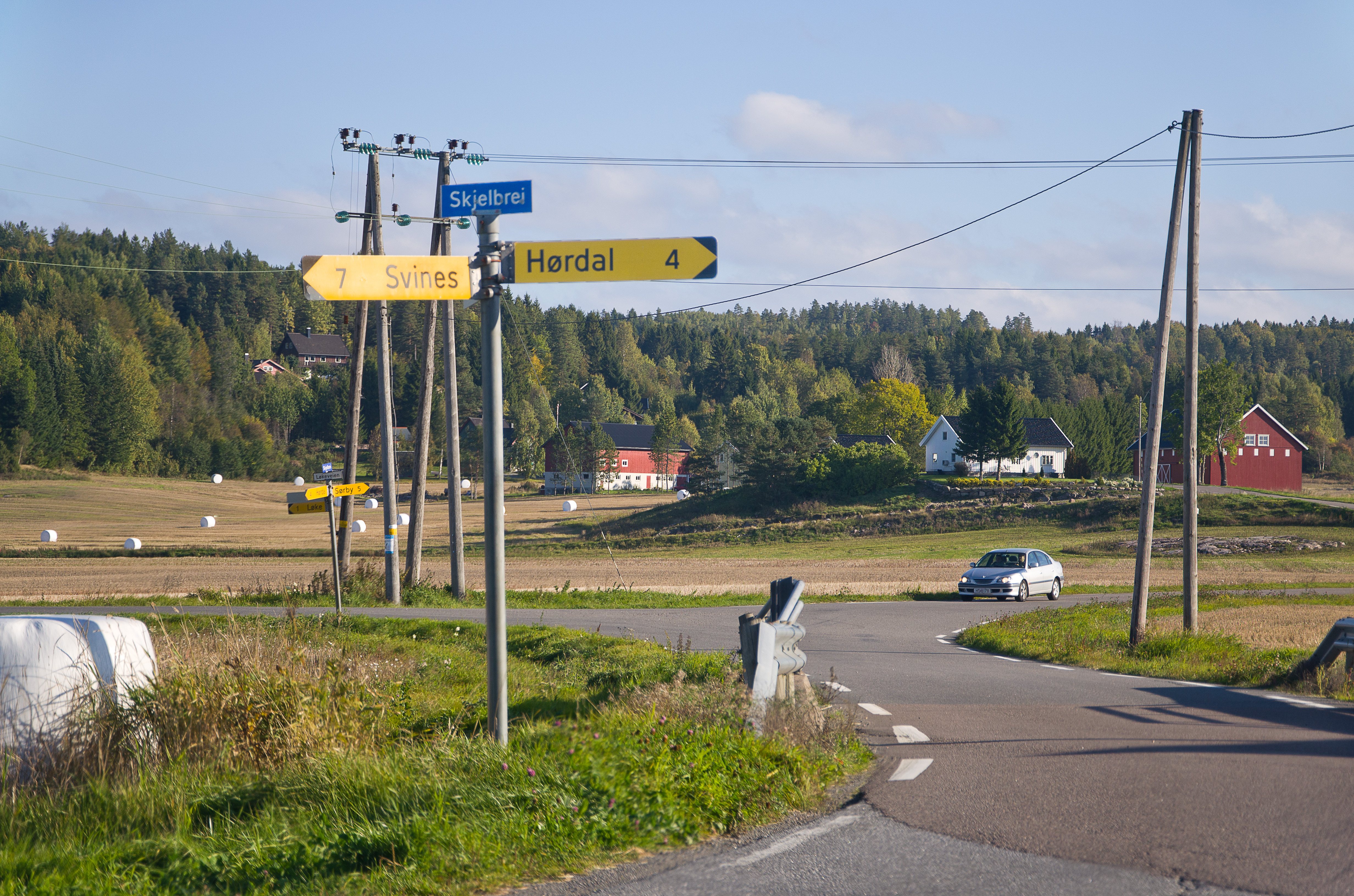 Vestfolds fylkesvei 290 (Gjennestadveien/Bjørndalsveien) og 295 (Løkeveien) krysser hverandre ved Skjelbred/Skjelbrei i Stokke kommune.